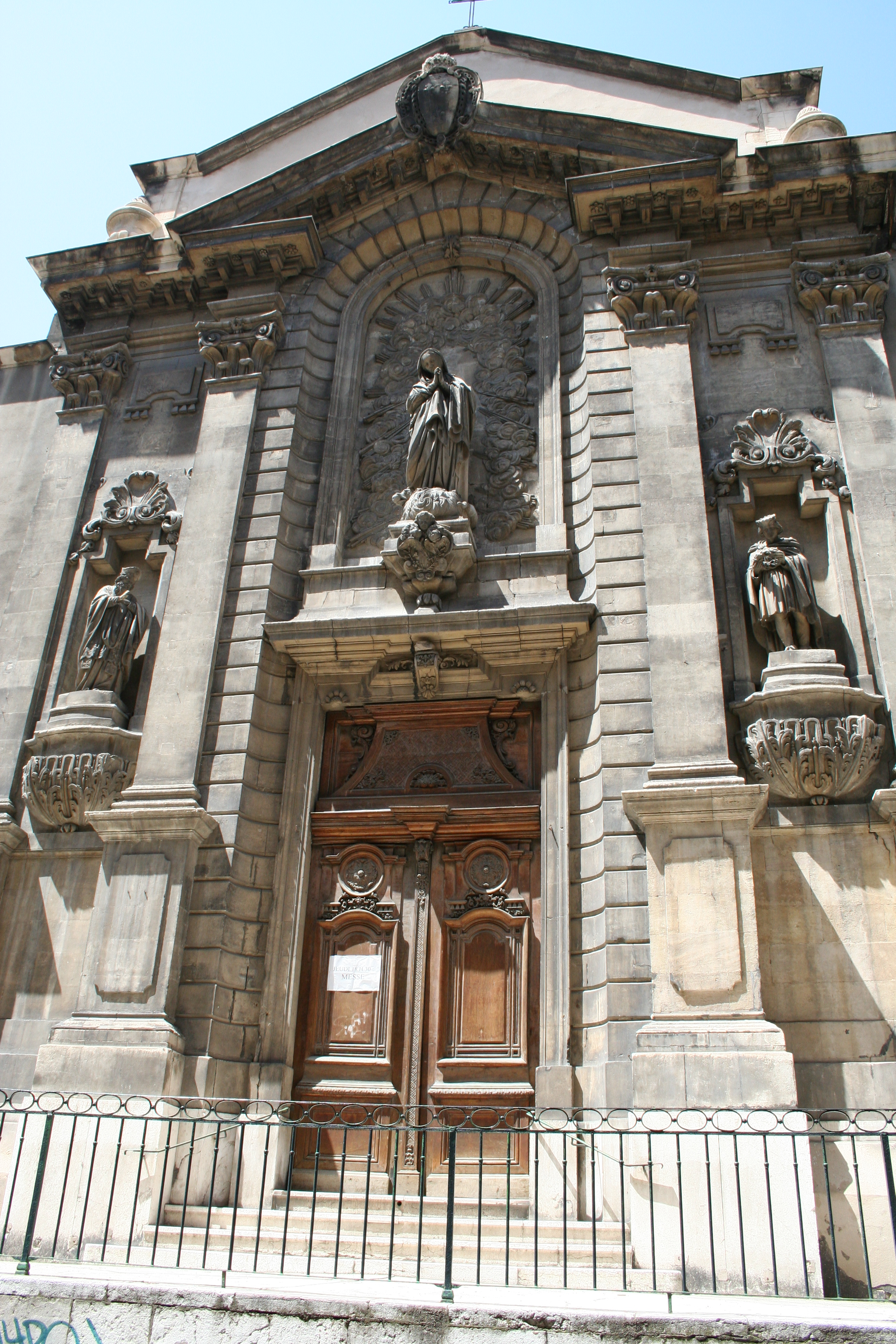 église Saint Théodore 3 rue des Dominicaines à Marseille.